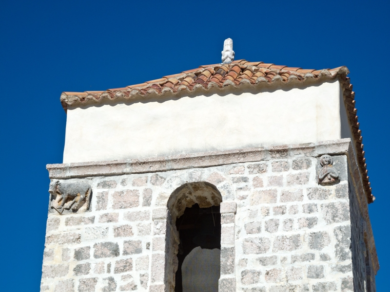 Crkva sv. Lucije u Jurandvoru